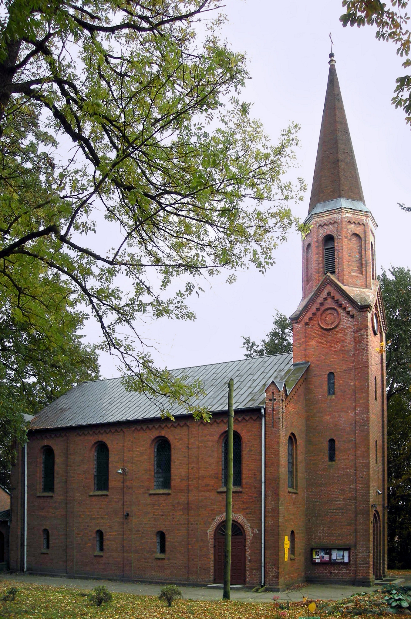 Kościół p.w. Św. Antoniego z Padwy w Grabównie